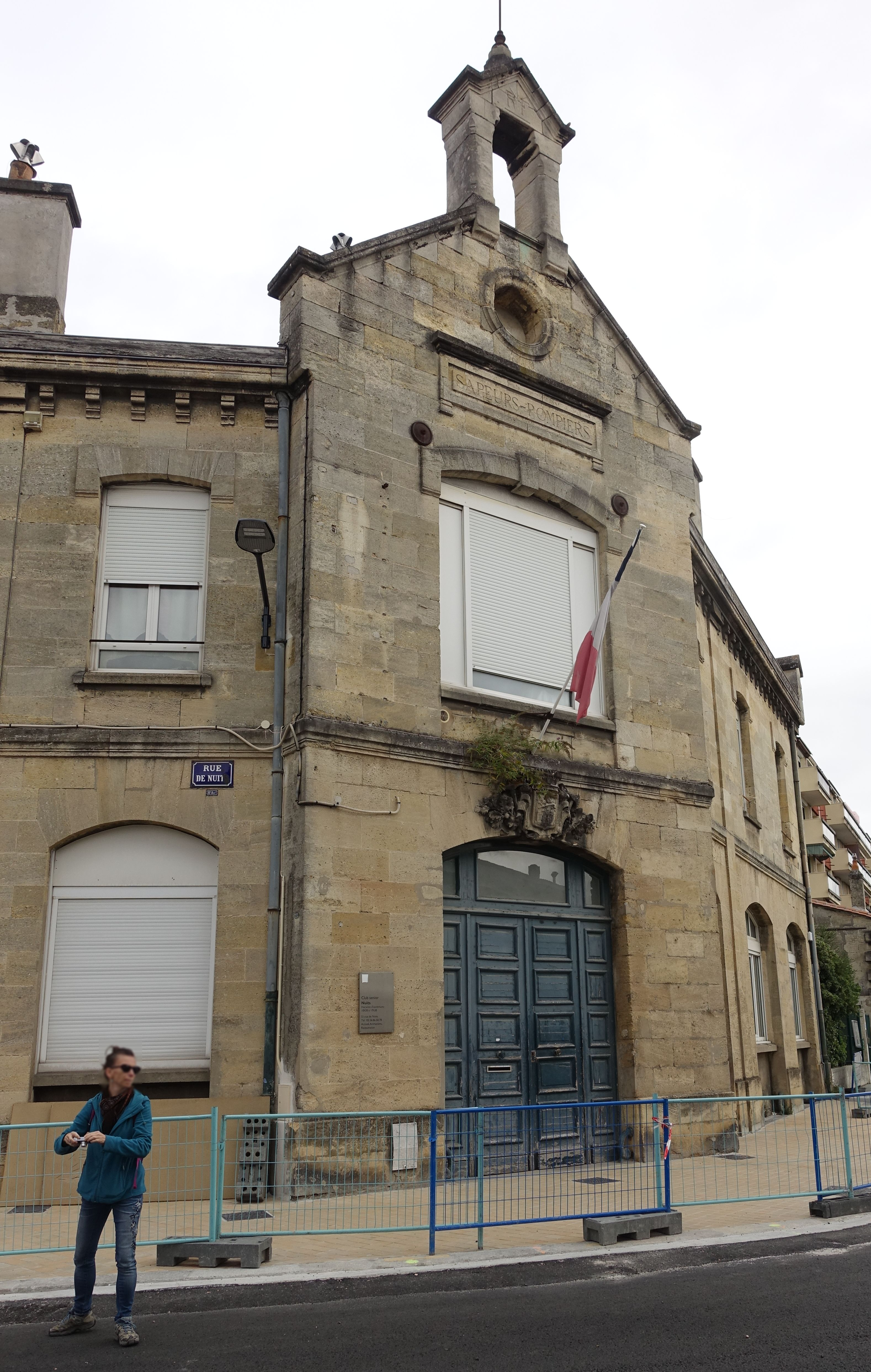 Un des quatre postes de pompiers de La Bastide, construit en 1886-1888 par l'architecte de la ville, Charles Durand, et remplacé par la nouvelle caserne de La Benauge de 1954